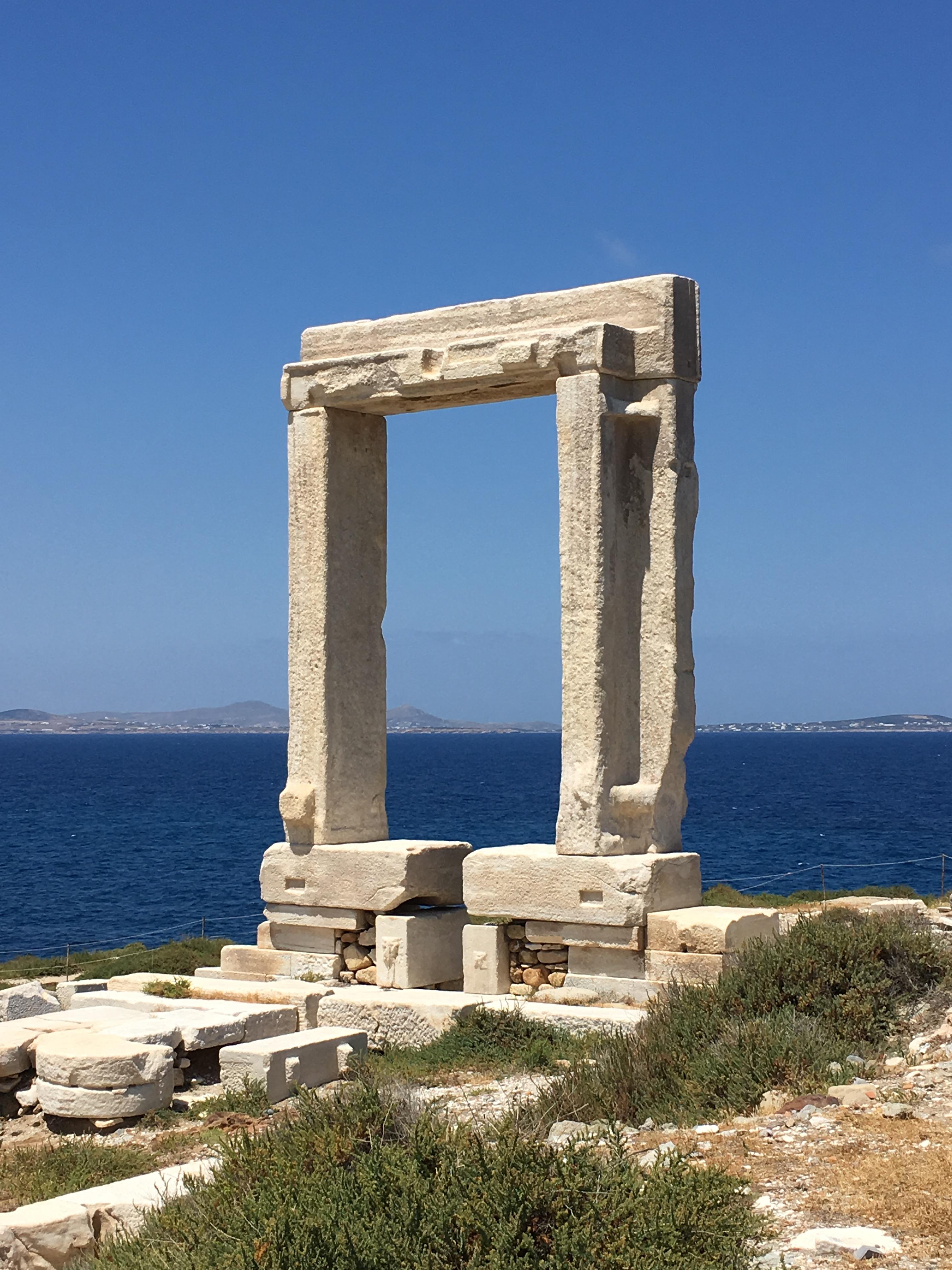 Portara, antikes Tempeltor auf Naxos